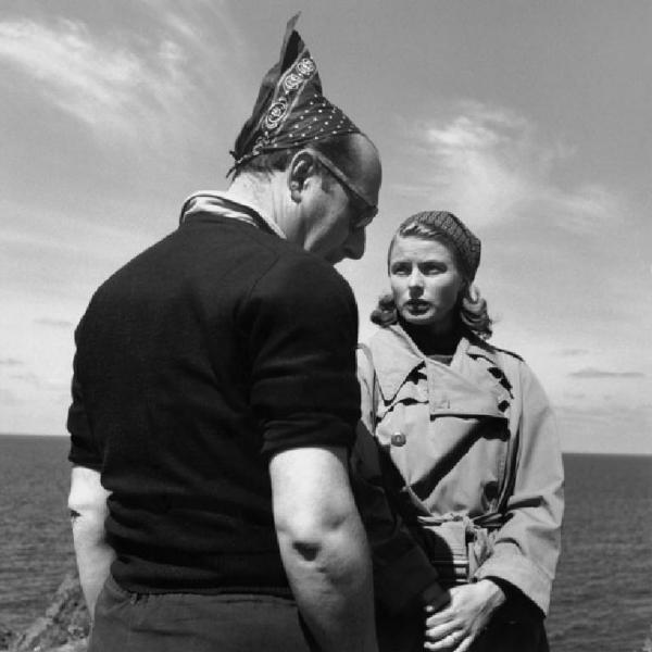 Messina - Stromboli - L'attrice Ingrid Bergman e il regista Roberto Rossellini sul set del film "Stromboli, terra di Dio"